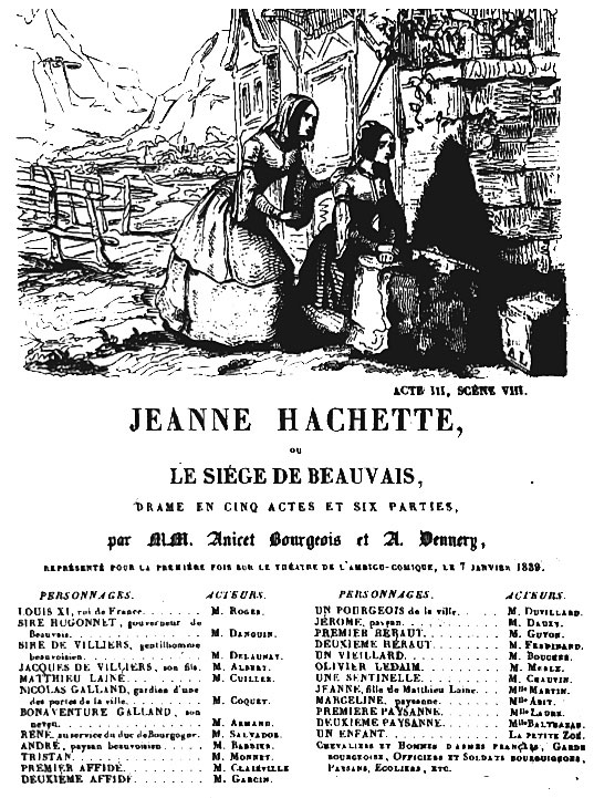 Page d'en-tête de la pièce de théâtre "Jeanne Hachette ou Le Siège de Beauvais" d'Anicet Bourgeois et A. Dennery.